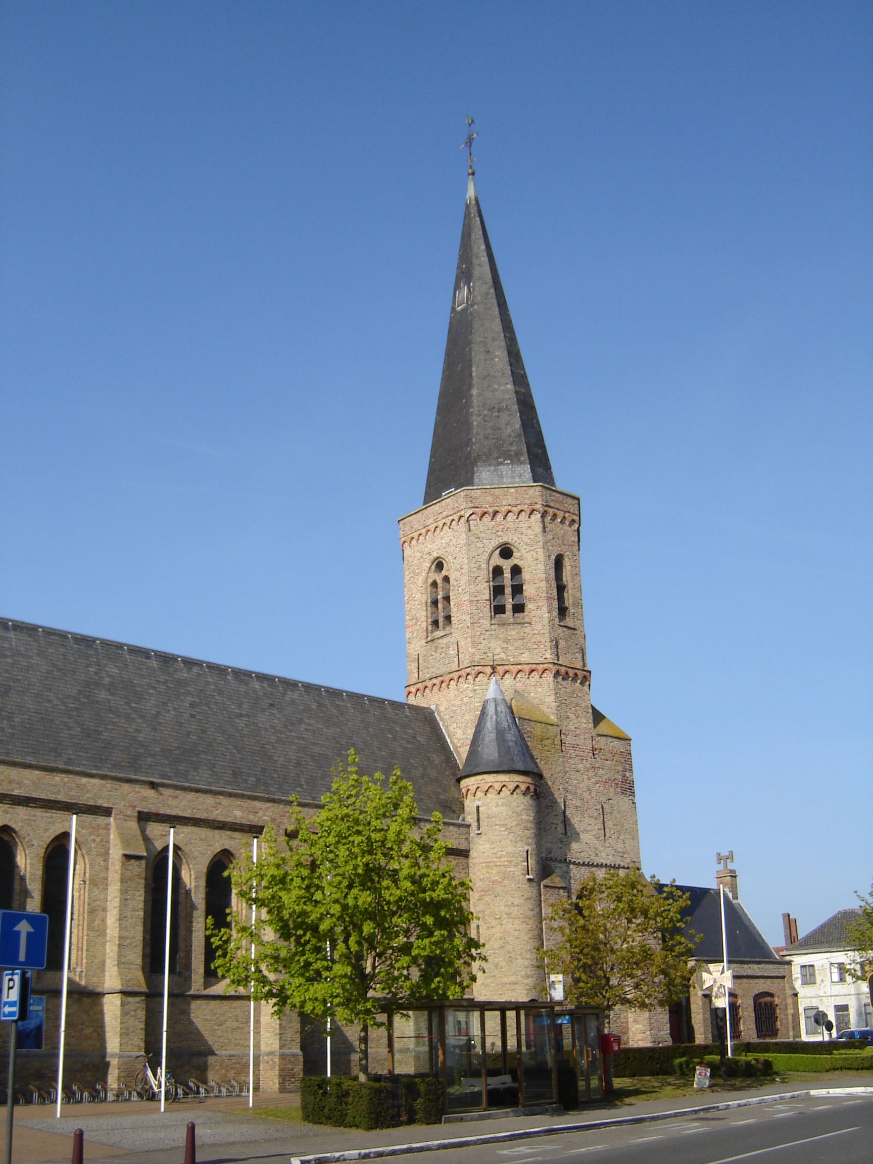 Sint-Audomaruskerk in Westkerke Church of Saint Audomare in Westkerke, Oudenburg, West Flanders, Belgium